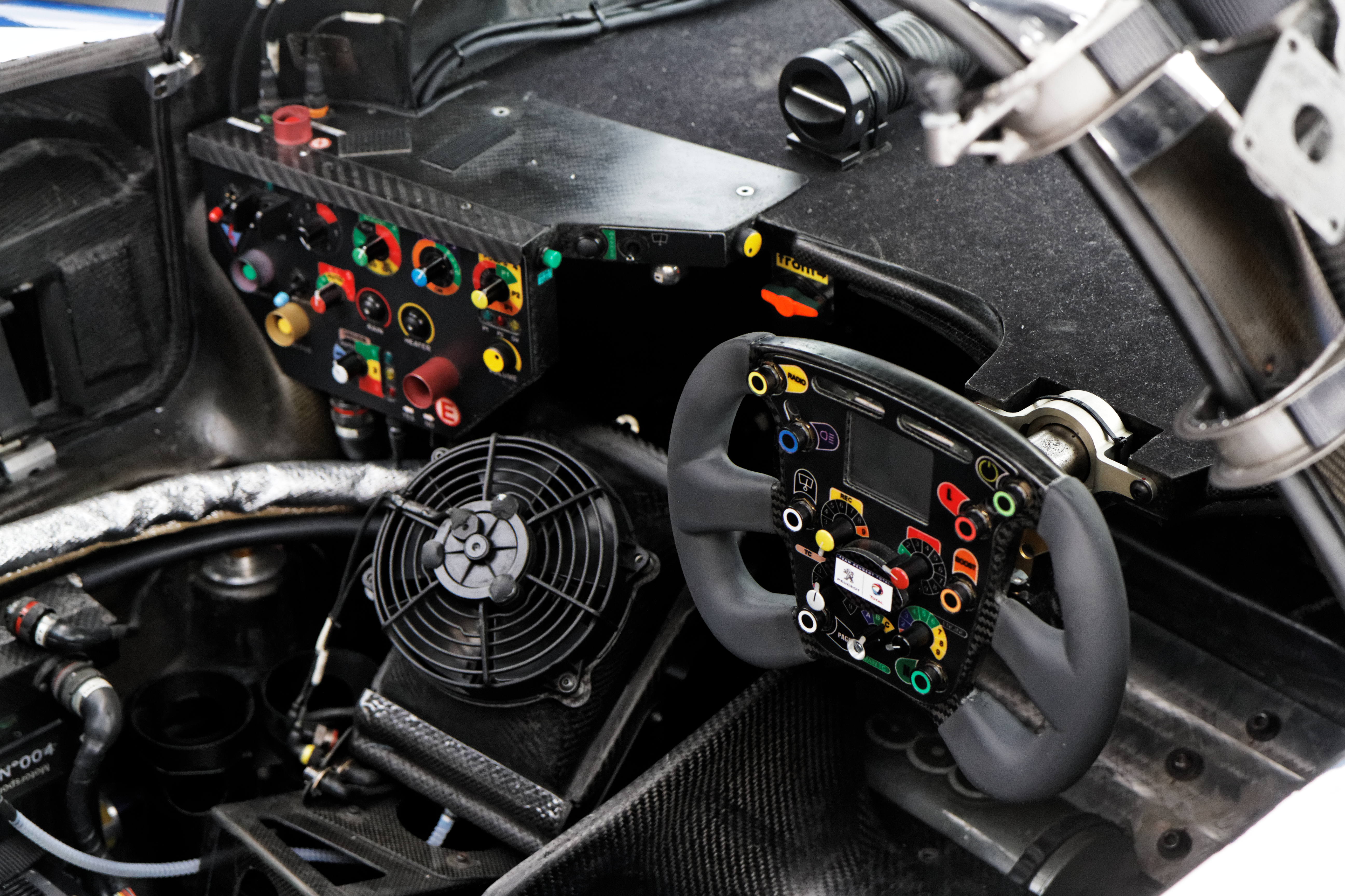 Une Peugeot 908 HDI FAP Le Mans prototype de 2008.